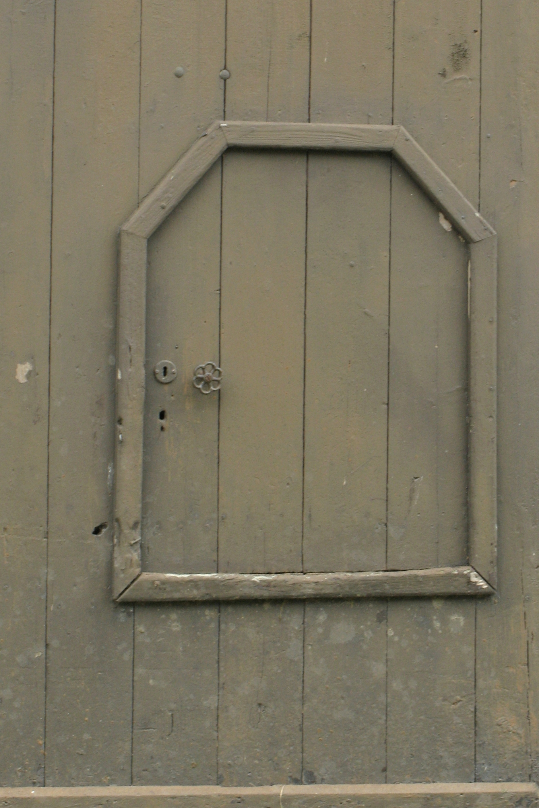 En Hierzel an enger Scheierpaart.